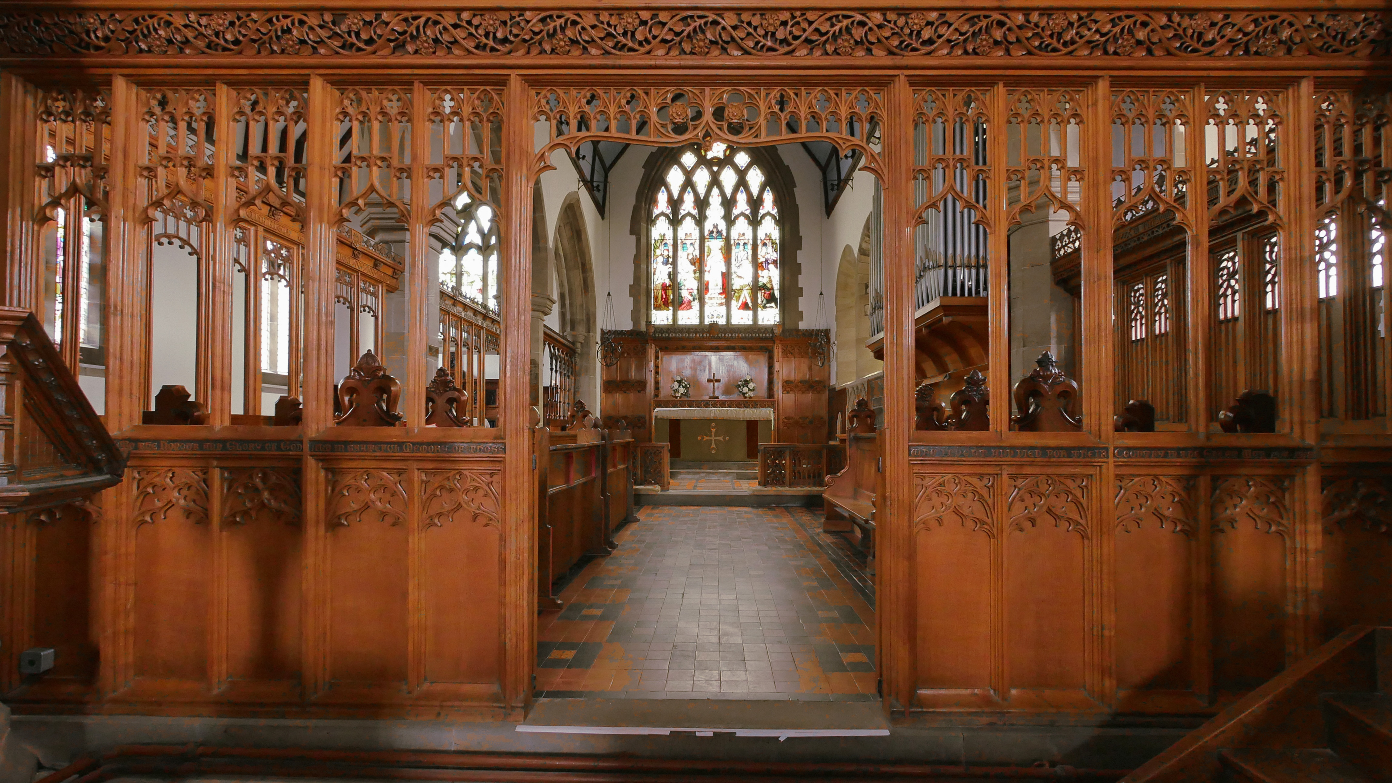 All Saints church, Kirkbymoorside